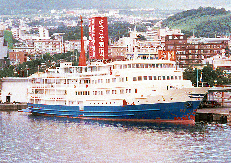 広別汽船 広島－呉－別府航路フェリー 阿蘇